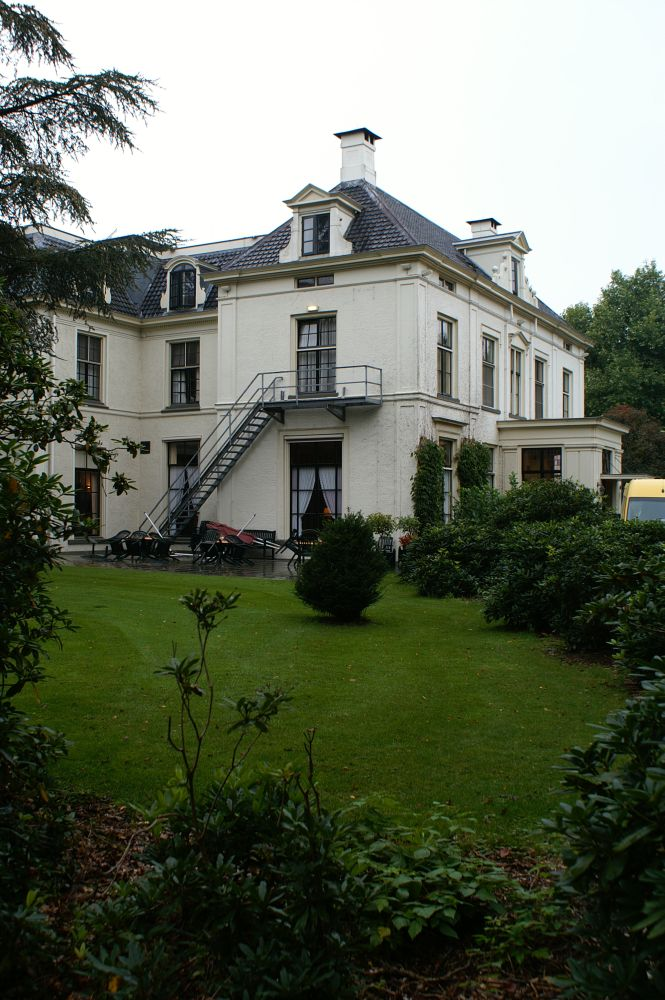 De tuin van huize IJsselvliedt te Wezep.